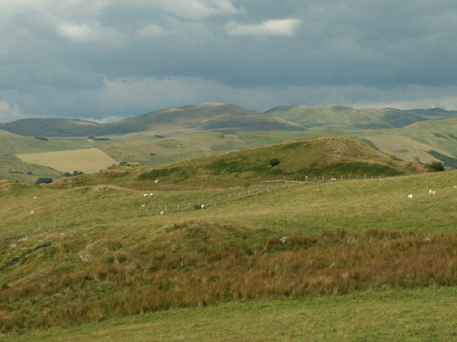 Pen-dinas hillfort, Mynydd Gorddu